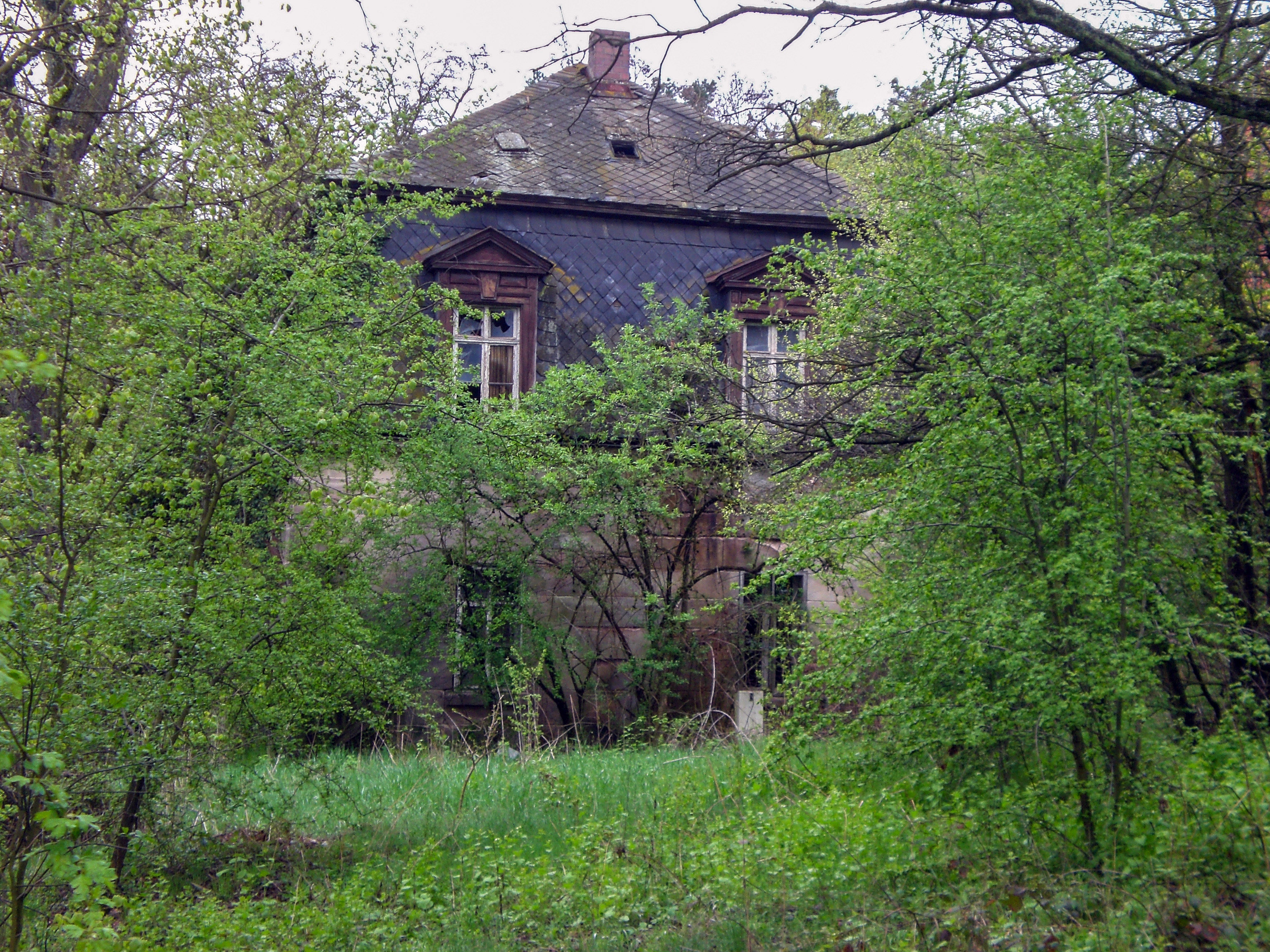 Haus, ehemalige Ziegelei